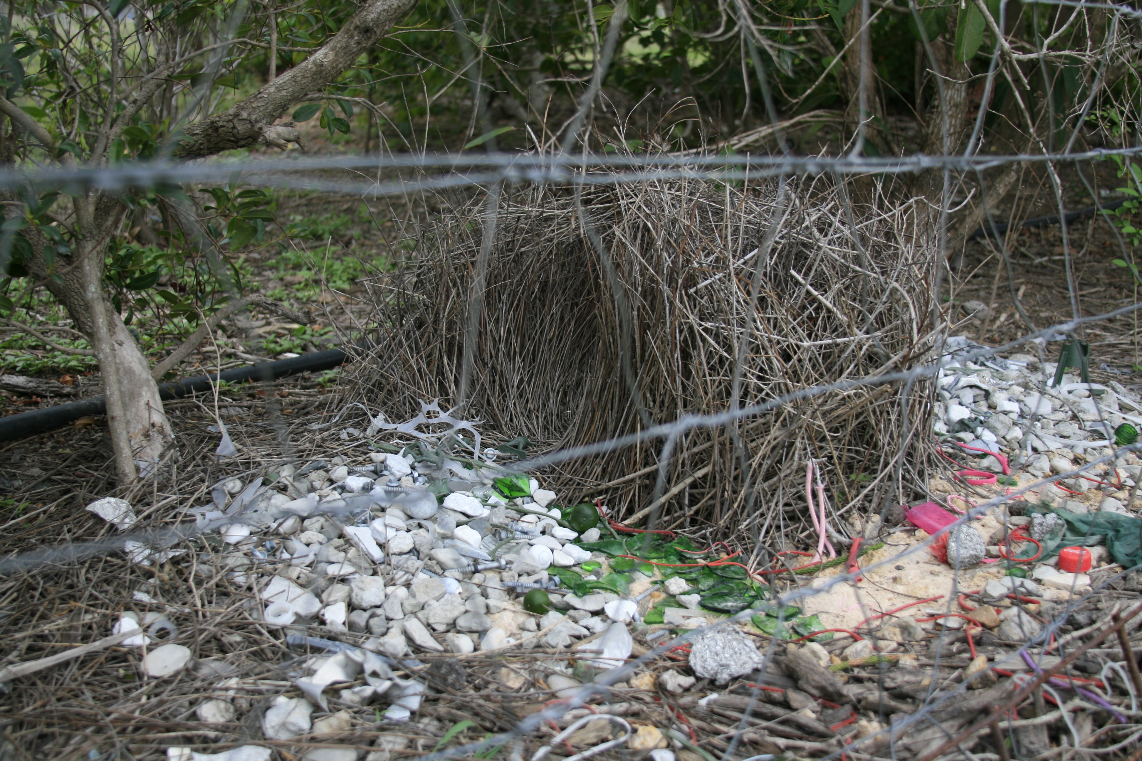 Bower Bird Nest